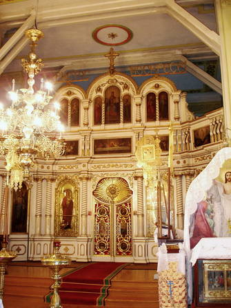 Беларусь, Турец. Церковь Покрова Пресвятой Богородицы. Иконостас